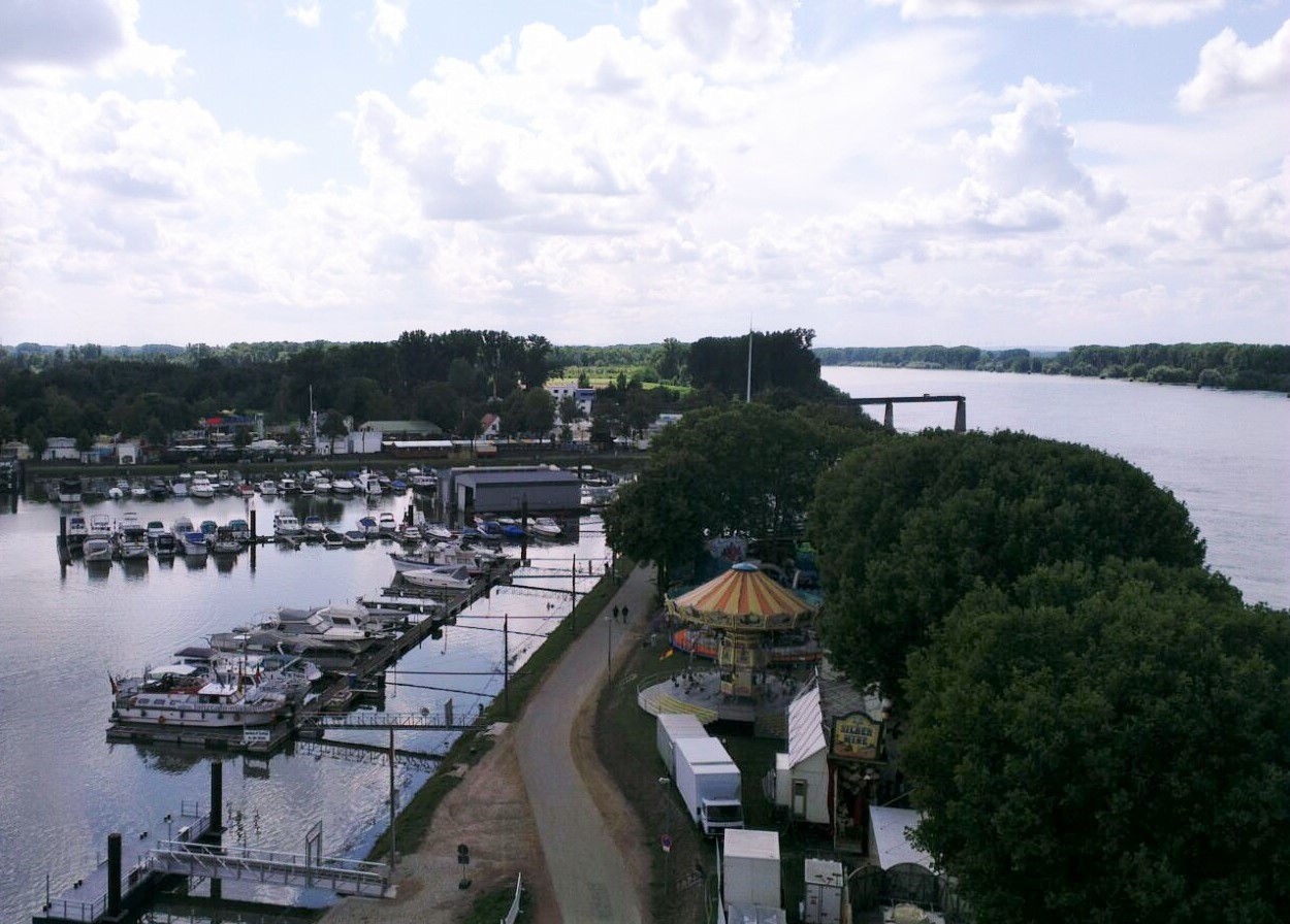 Rheinisches Fischerfest Gernsheim 4. August 2014, aufgenommen um 14:17 Uhr